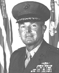 Link:[1]